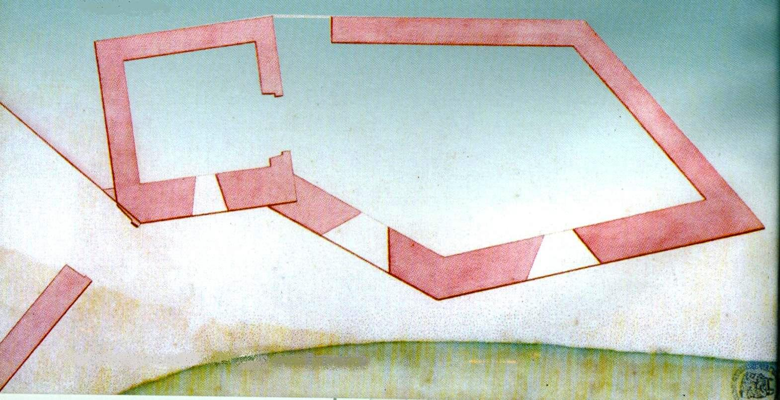 Segundo forte (Reduto) da Ribeira Seca. MACHADO, Francisco Xavier. "Revista dos Fortes e Redutos da Ilha Terceira" (1772). in MARTINS, José Salgado, "Património Edificado da Ilha Terceira: o Passado e o Presente". Separata da "Atlântida", vol. LII, 2007. p. 40.